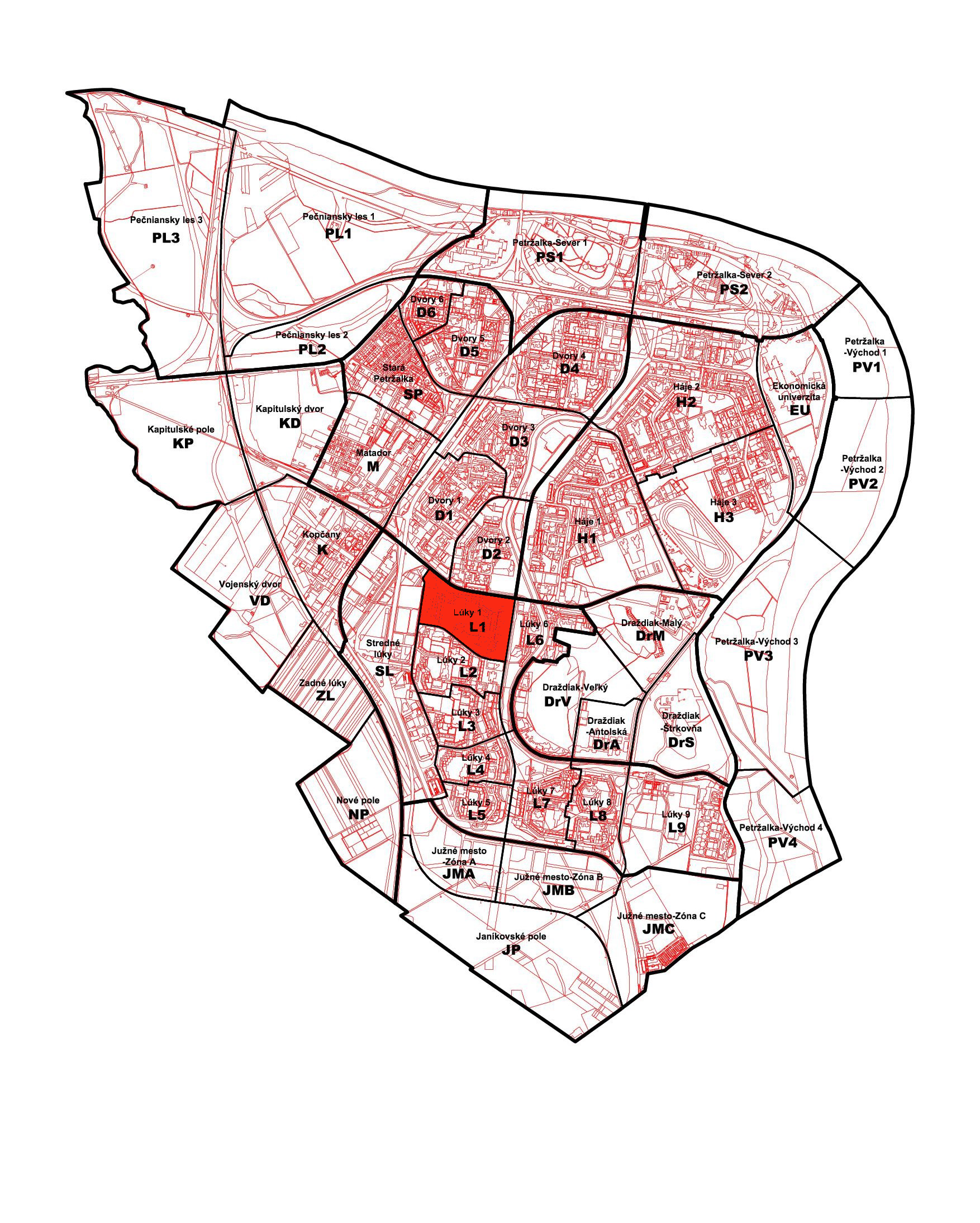 Poloha petržalskej miestnej časti